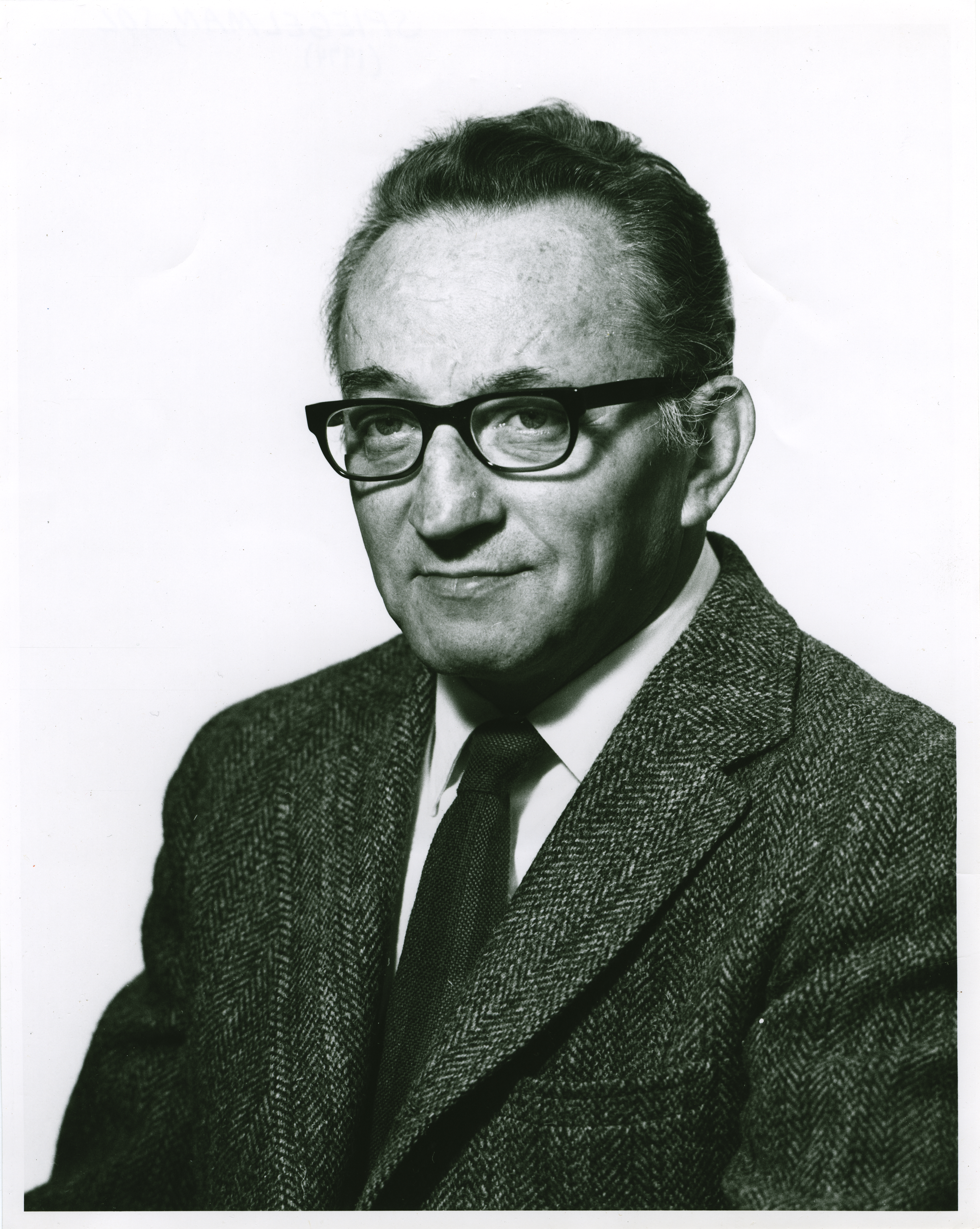 Sol Spiegelman Файл:SolSpiegelman.jpg